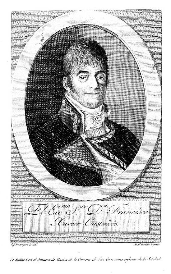 Retrato del general Castaños firmado Cayº Rodriguez lo dib., Andrs. Giraldos lo grabo. Incorporado a una recopilación de escritos titulada "Reales ordenes de la Junta Central Suprema de Gobierno del Reyno y Representaciones de la de Sevilla y del General Castaños acerca de su separacion del mando del exercito de operaciones del Centro, con las demas contestaciones que han producido este asunto", Madrid, 1809. Texto firmado en el Real Palacio de Aranjuez, octubre de 1808.